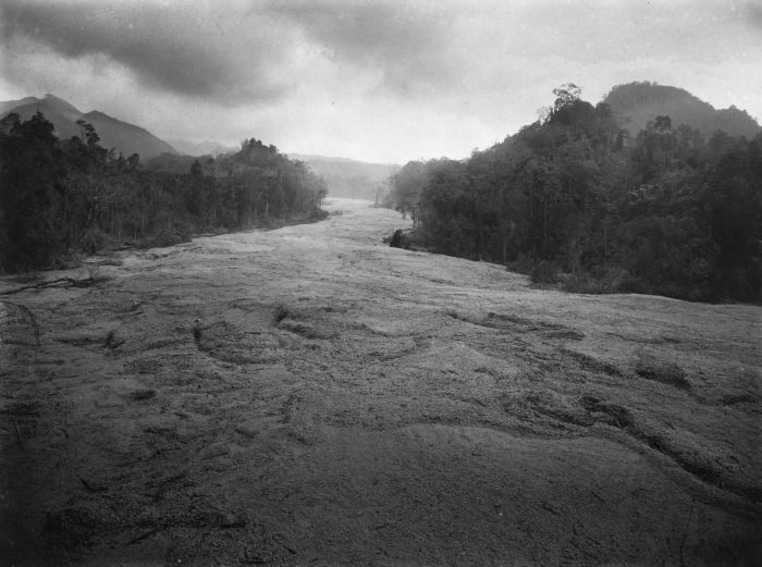 Foto. Een zestien meter diepe modderstroom bij Redjosari, na de uitbarsting van de vulkaan Kelud